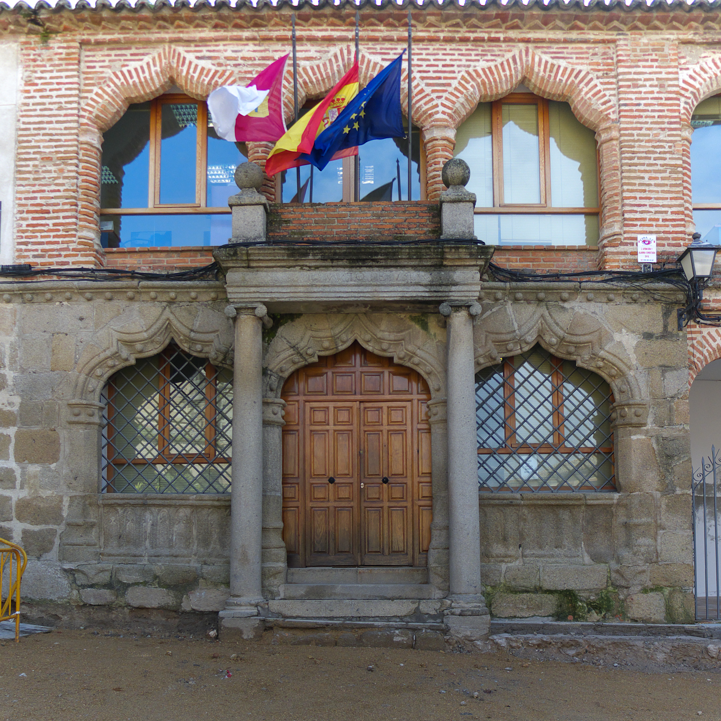 Antiguo ayuntamiento (s. XVI)